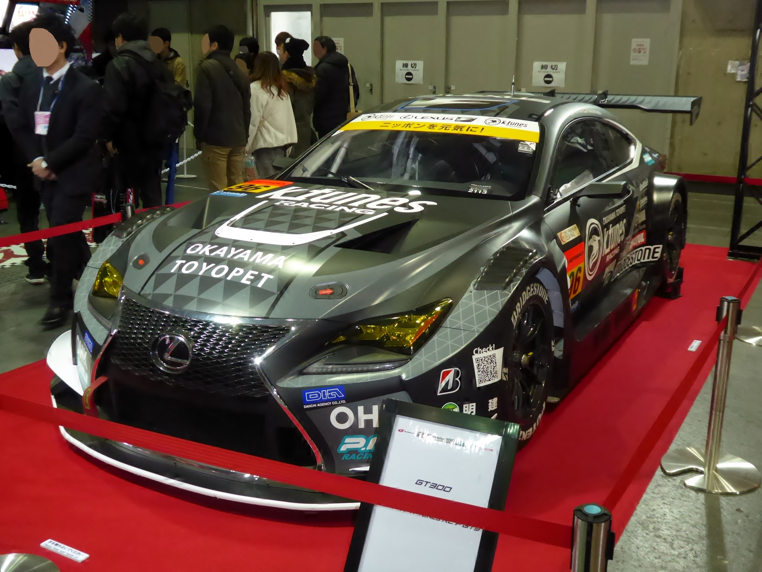 大阪オートメッセ2018に於いて96号車岡山トヨペットK-tunes RC F GT3の2018年仕様を撮影。